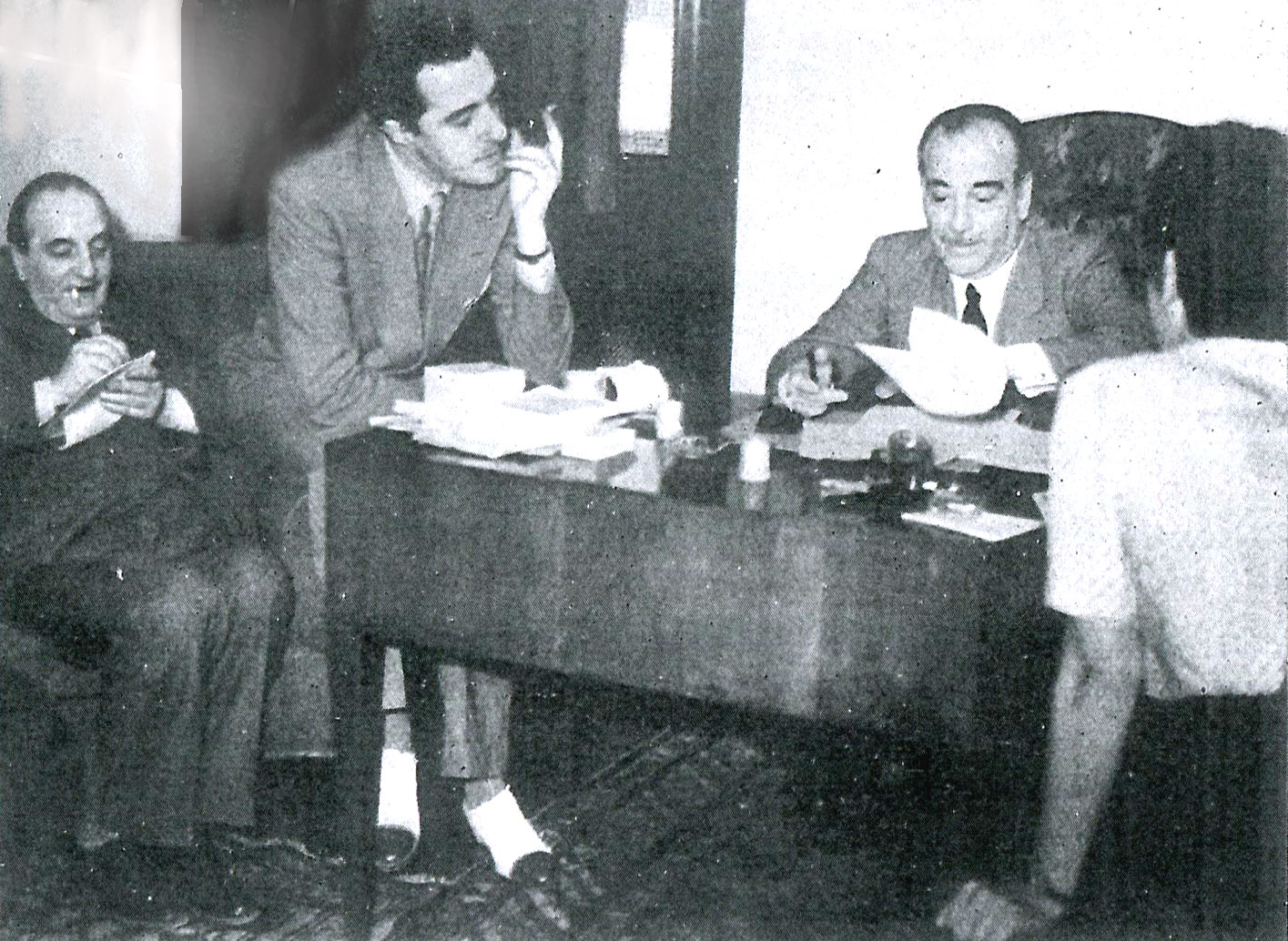 Alcuni sceneggiatori di "I bambini ci guardano" (De Sica, 1943)